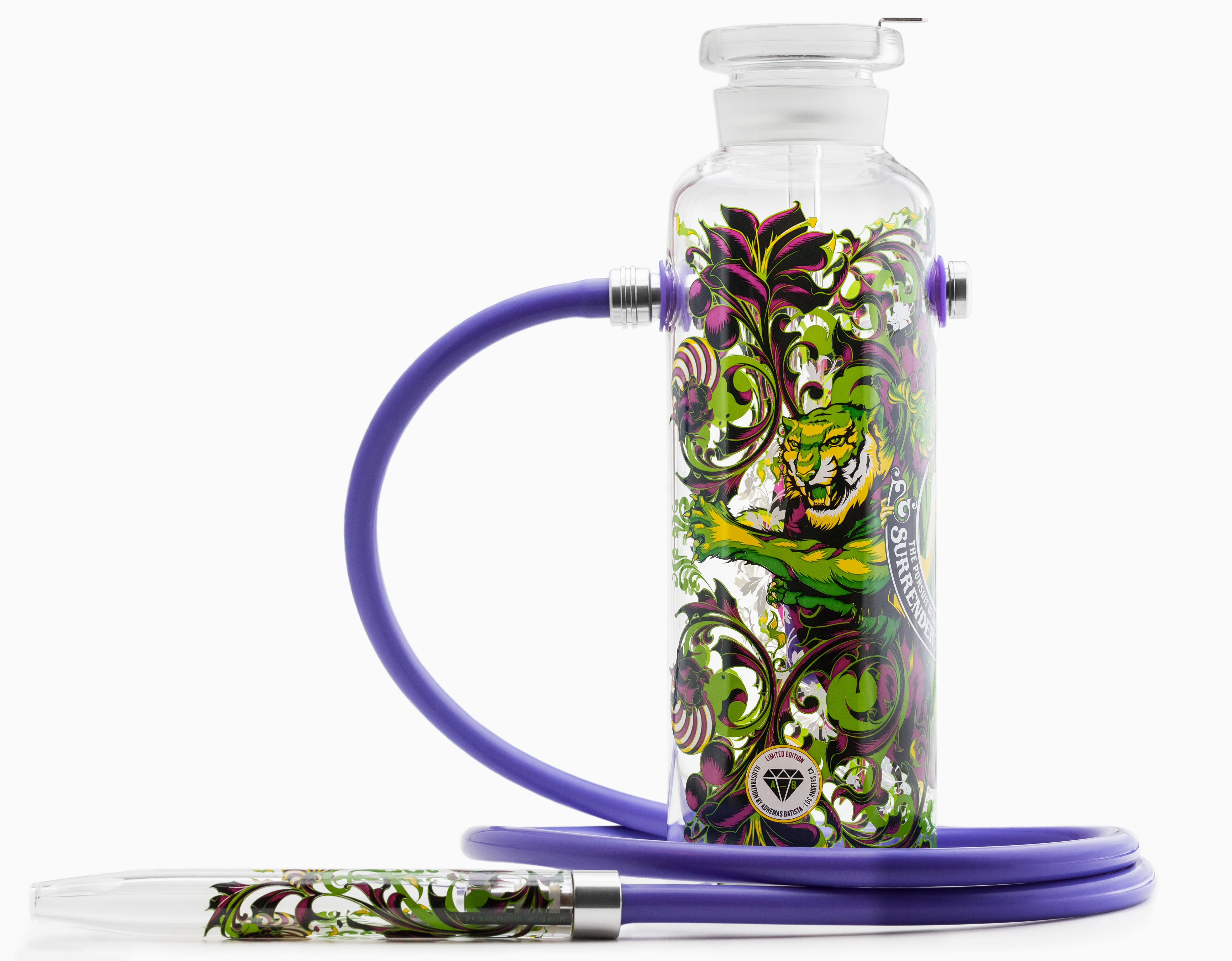 Необычные кальяны из стекла CWP